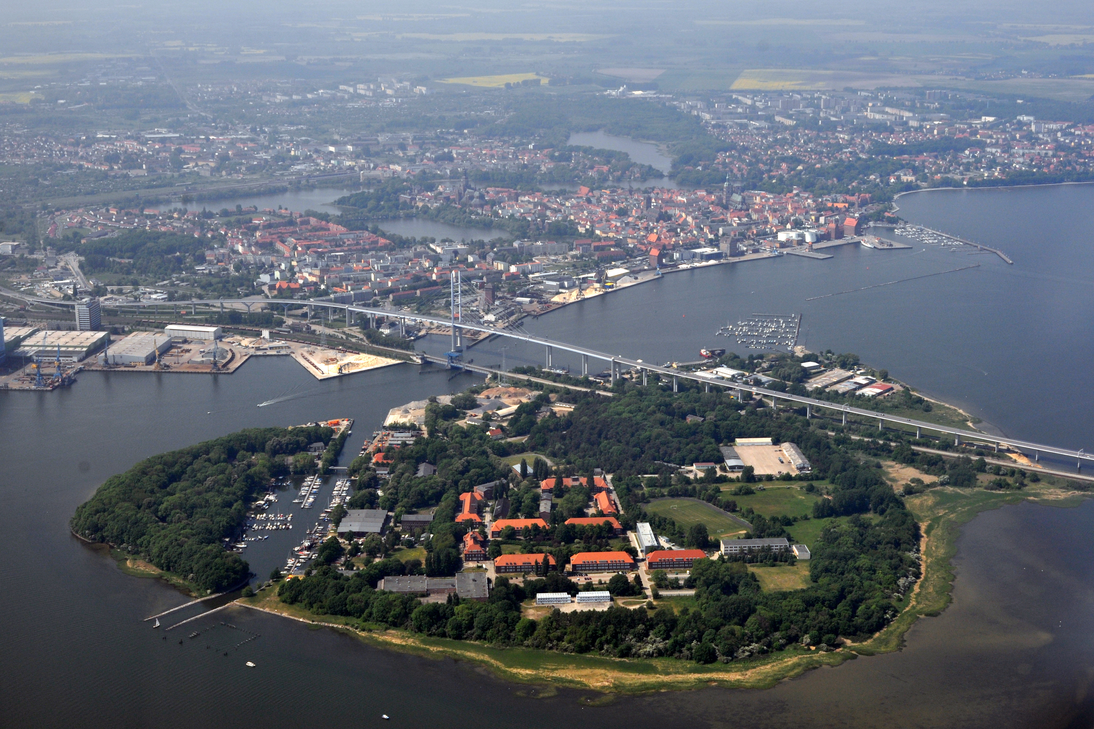 Die Bilder wurden von mir während eines einstündigen Rundflugs ab Flugplatz Güttin am 21. Mai 2011 aufgenommen. Die Bildbeschreibung steht im Dateinamen. Aufgenommen mit einer Nikon D5000 durch das Seitenfenster des Flugzeugs.